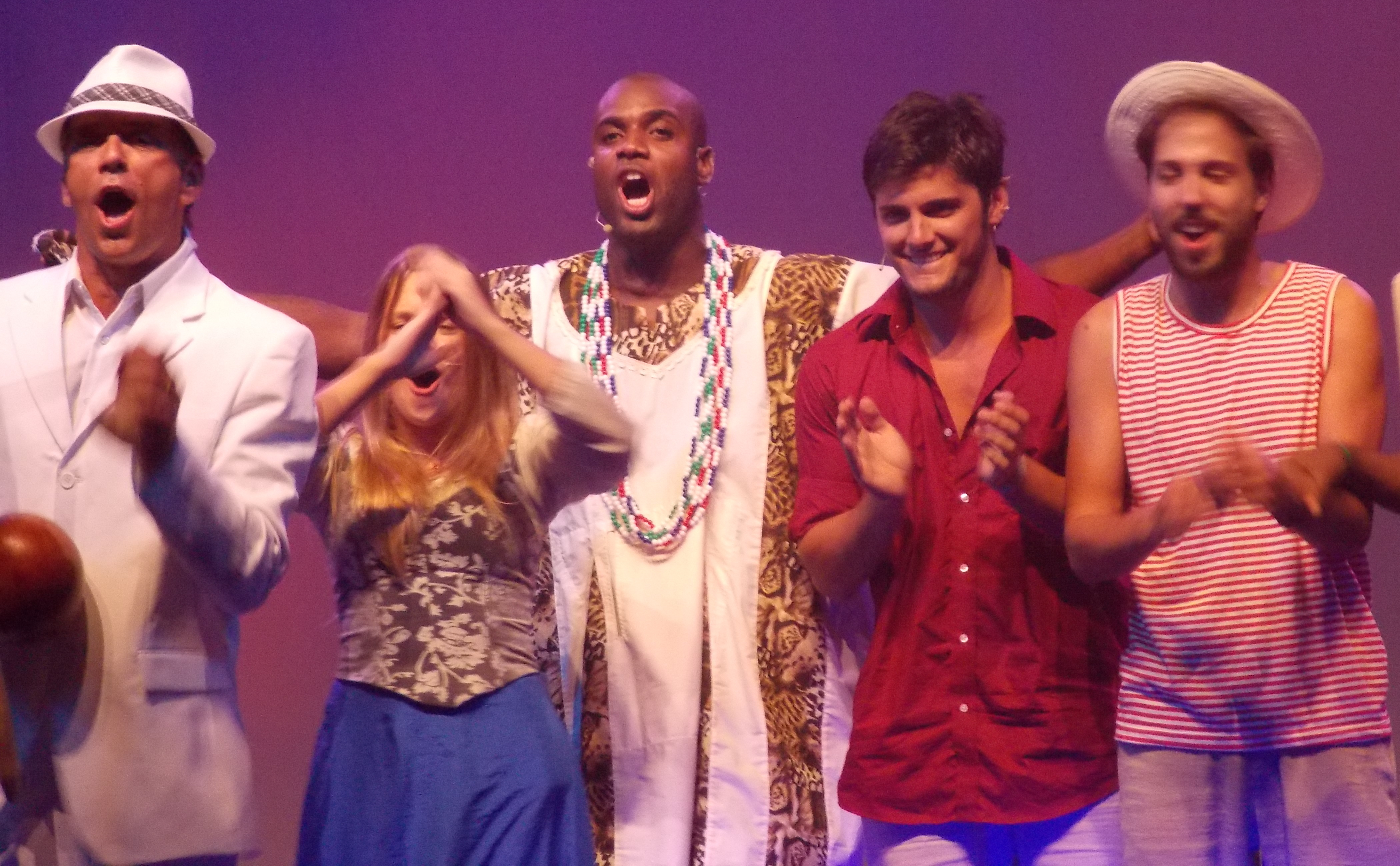 Evento: Festa Internacional de Teatro de Angra. Peça: Romeu na Roda. Elenco: Bruno Gissoni, Daniela Carvalho, Rafael Zulu, Marcos Breda, Rodrigo Simas, Felipe Simas e Beto Simas (Mestre Boneco).